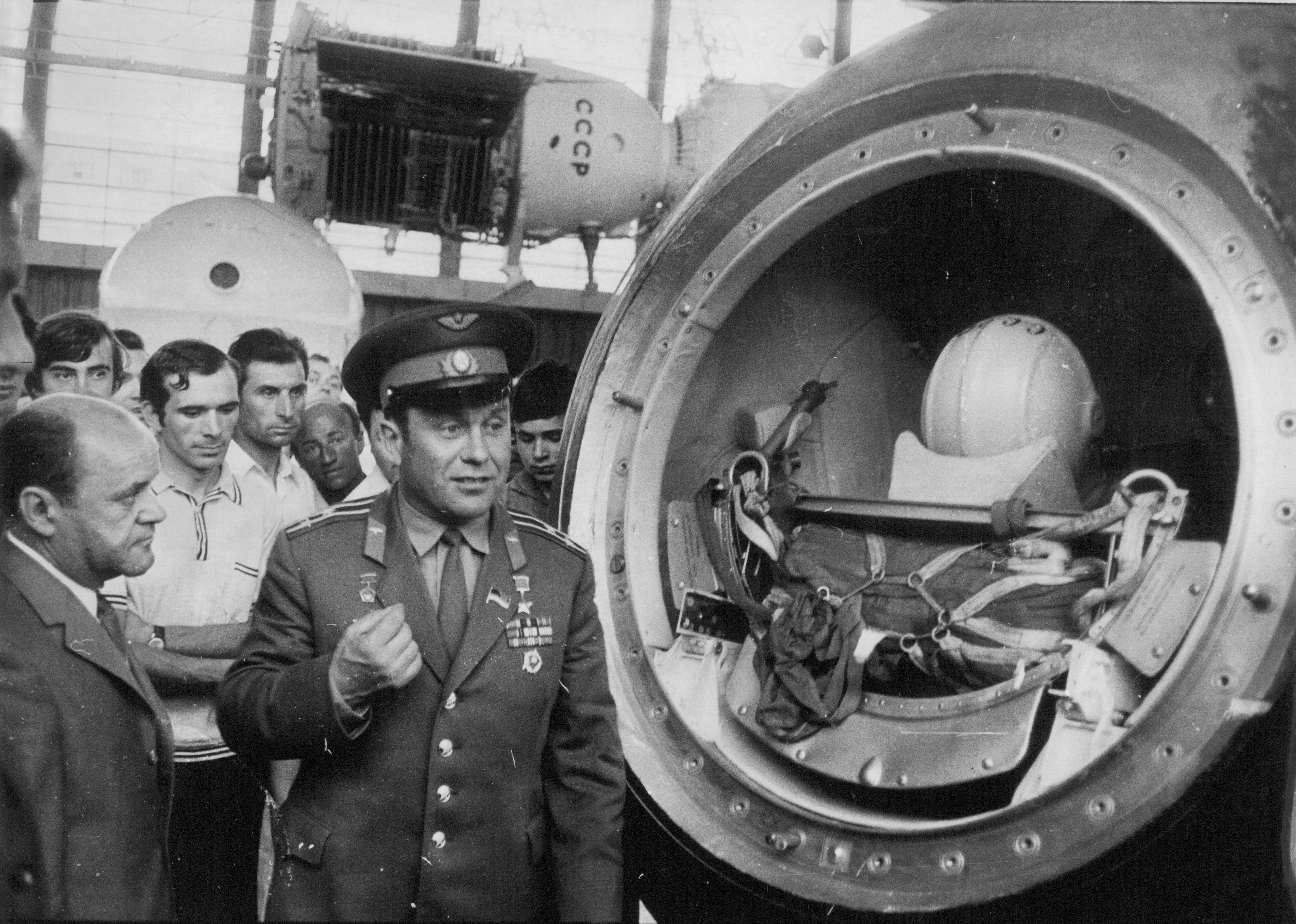 Pavel Popovič, sovjetski kosmaonaut sa Milivojem Juginom u poseti Beogradu.foto: Stevan Kragujević (po odobrenju kćerke Tanje Kragujević)